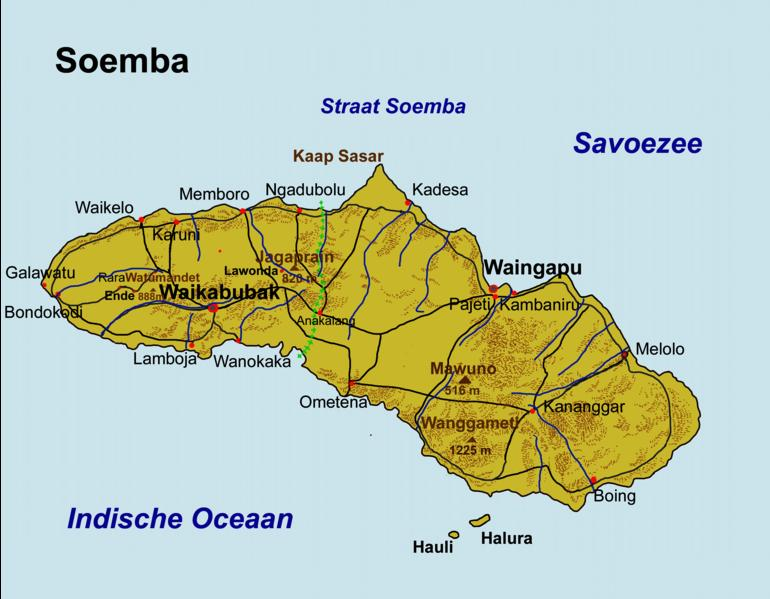 Plan de l'ile Sumba (Indonésie)